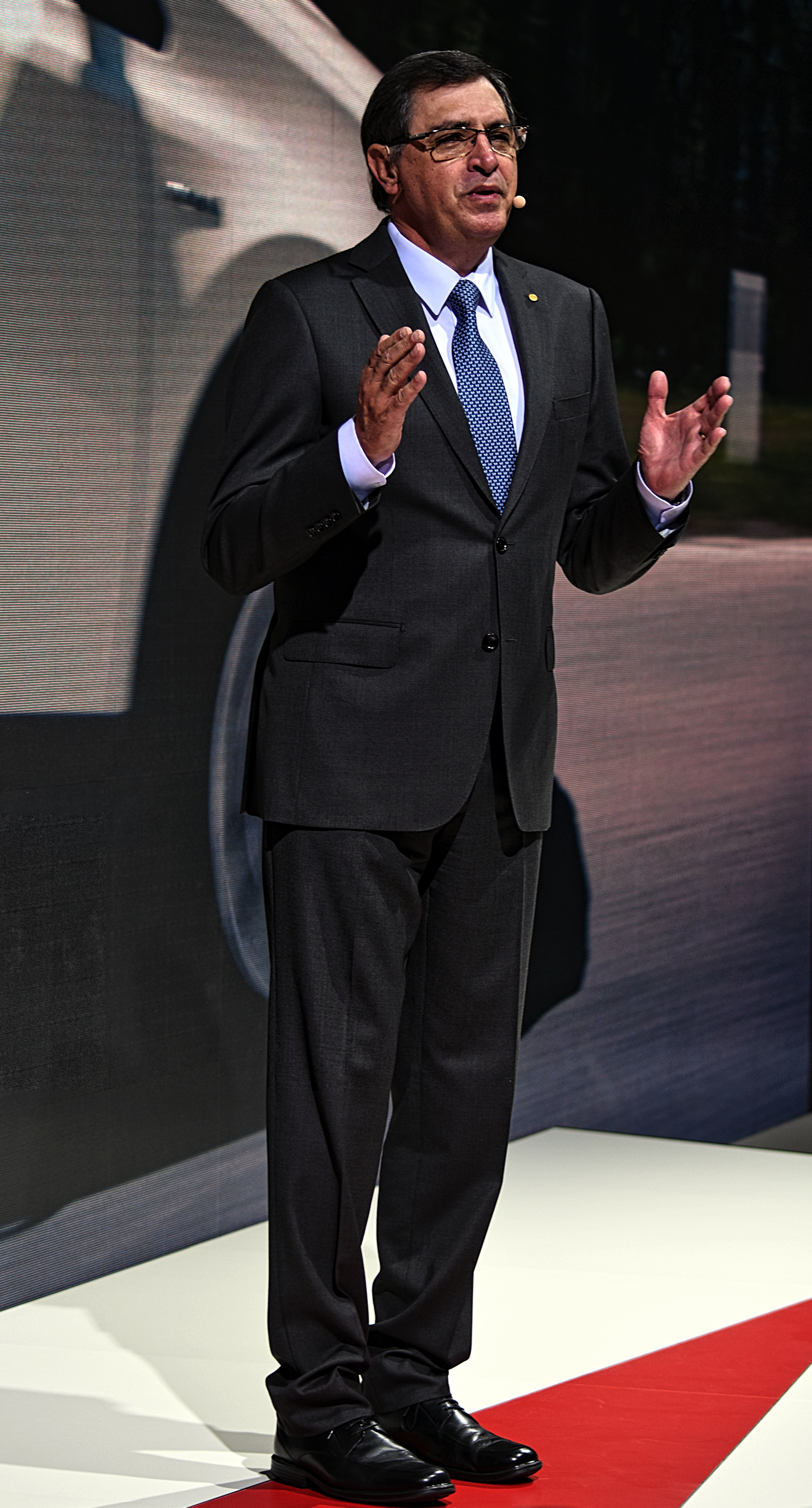 Johan Van Zyk, CEO von Toyota Motors Europe, auf der Toyota-Pressekonferenz am 12. September 2017.